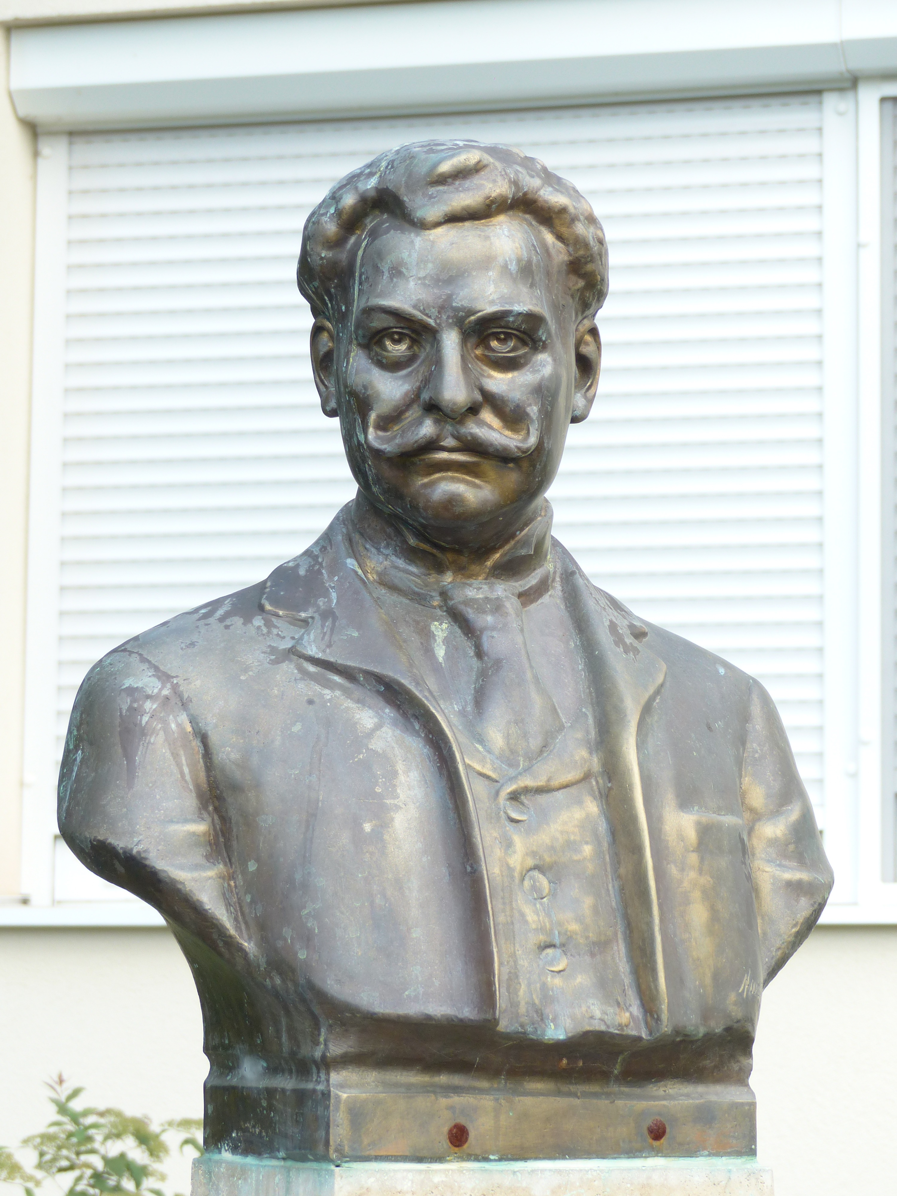 Jankovits Gyula mellszobra. A felvétel Pomázon készült, 2017. augusztus 21-én.